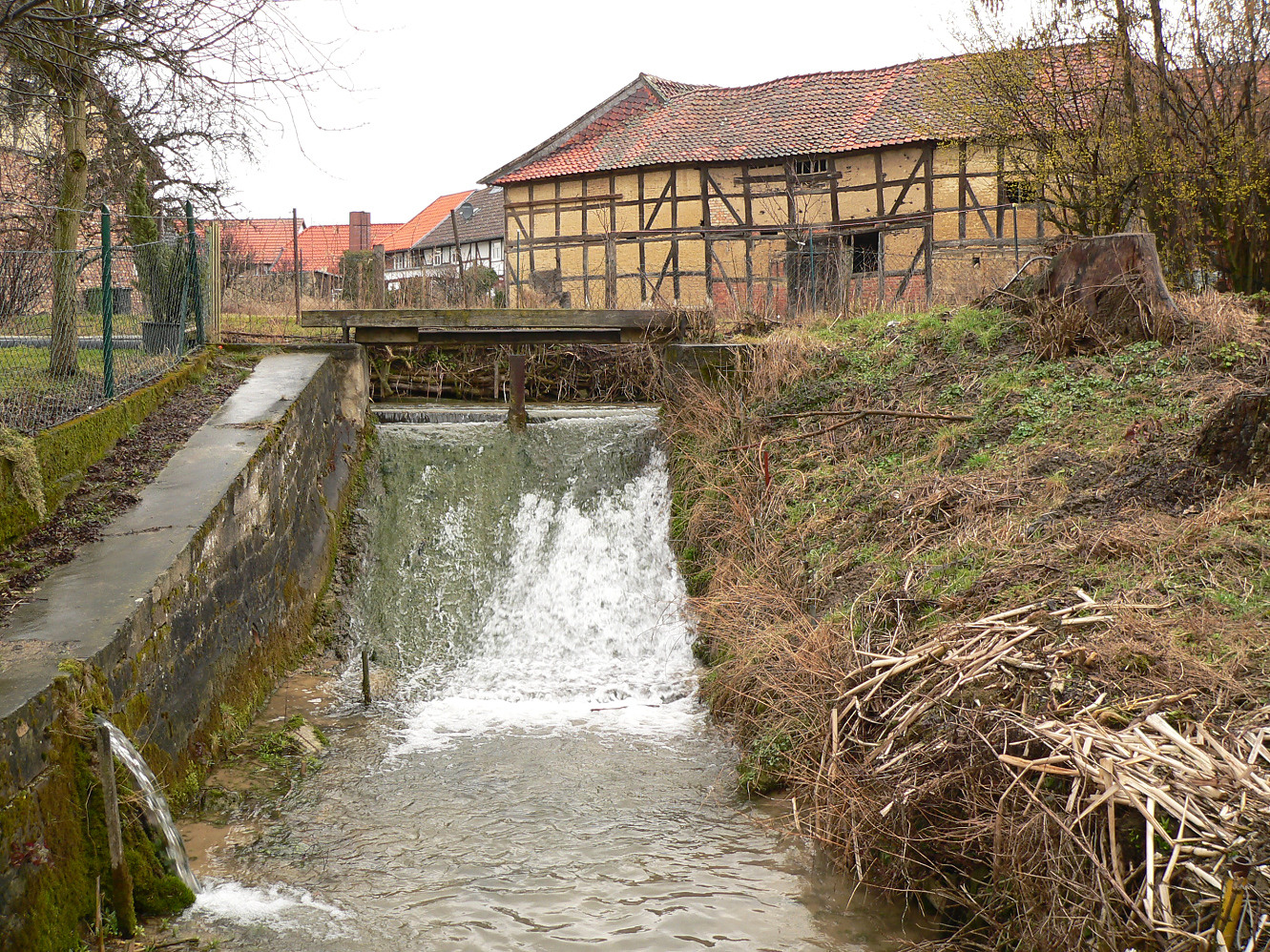 Schunter in Räbke von links nach rechts, Abzweig des Mühlengrabens (in Richtung der Kamera) von der Schunter